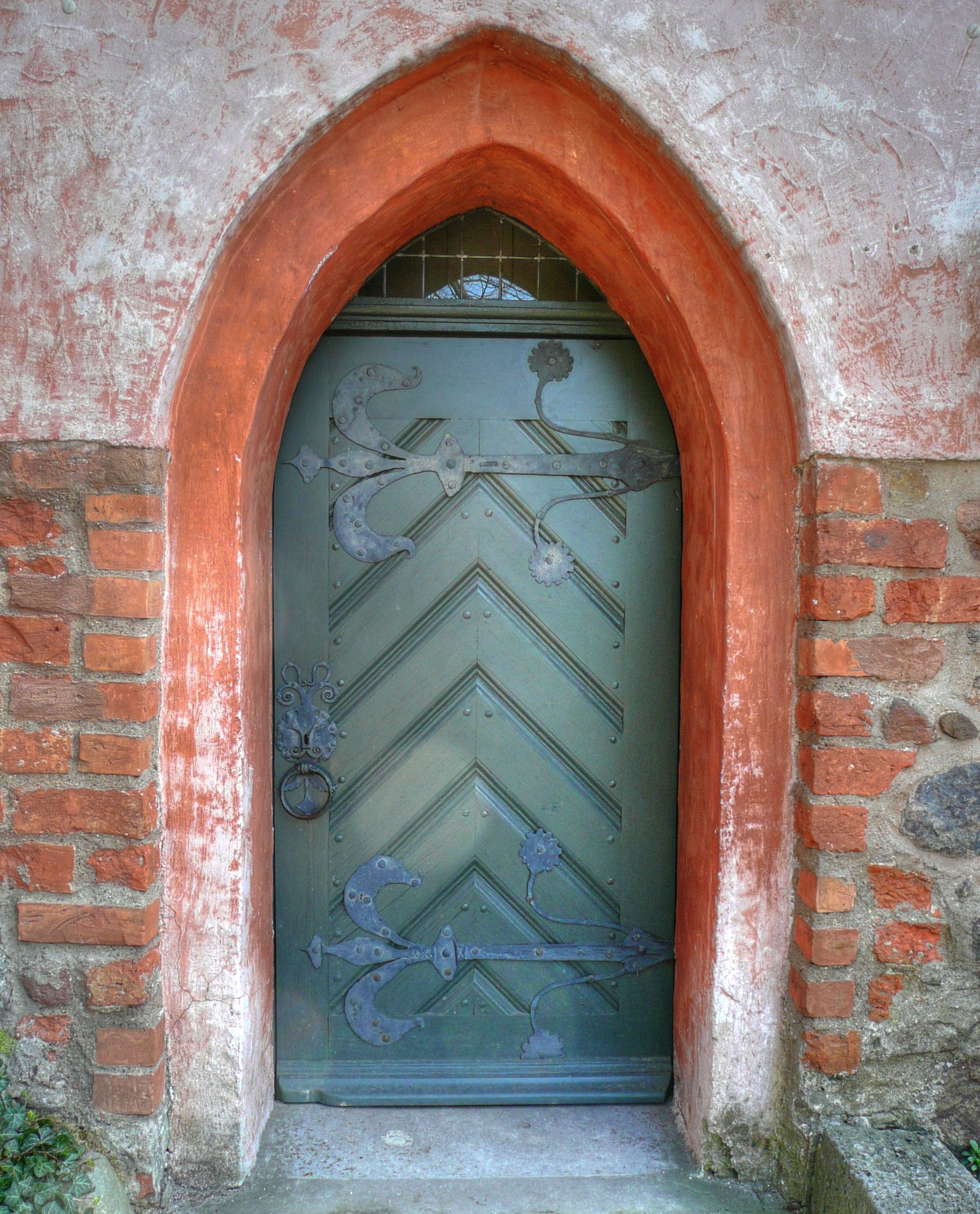 Westportal der St.-Annen-Kirche in Berlin-Dahlem